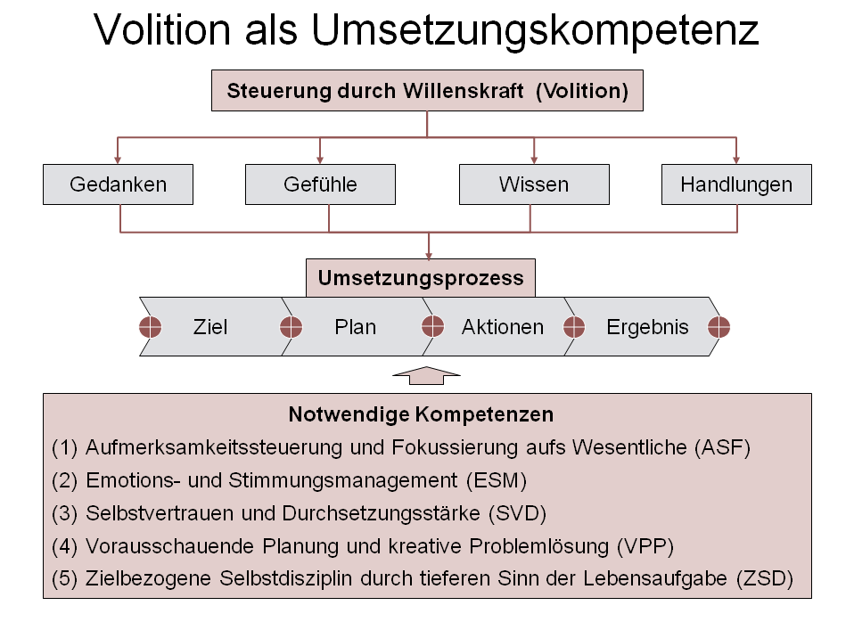 Volition und Selbststeuerung mit Umsetzungskompetenzen